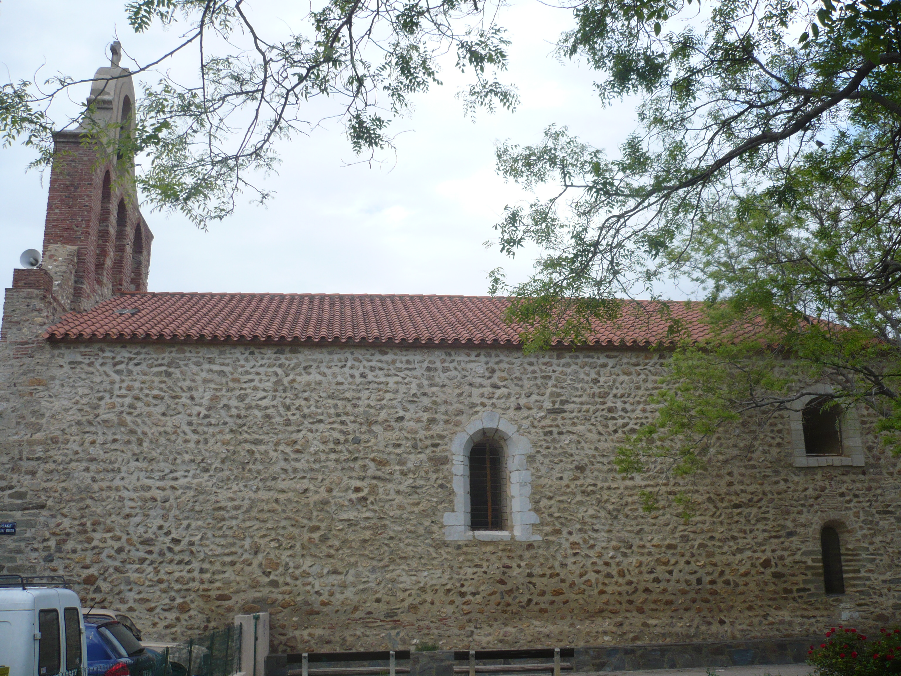 Église Saint-Martin de Fourques